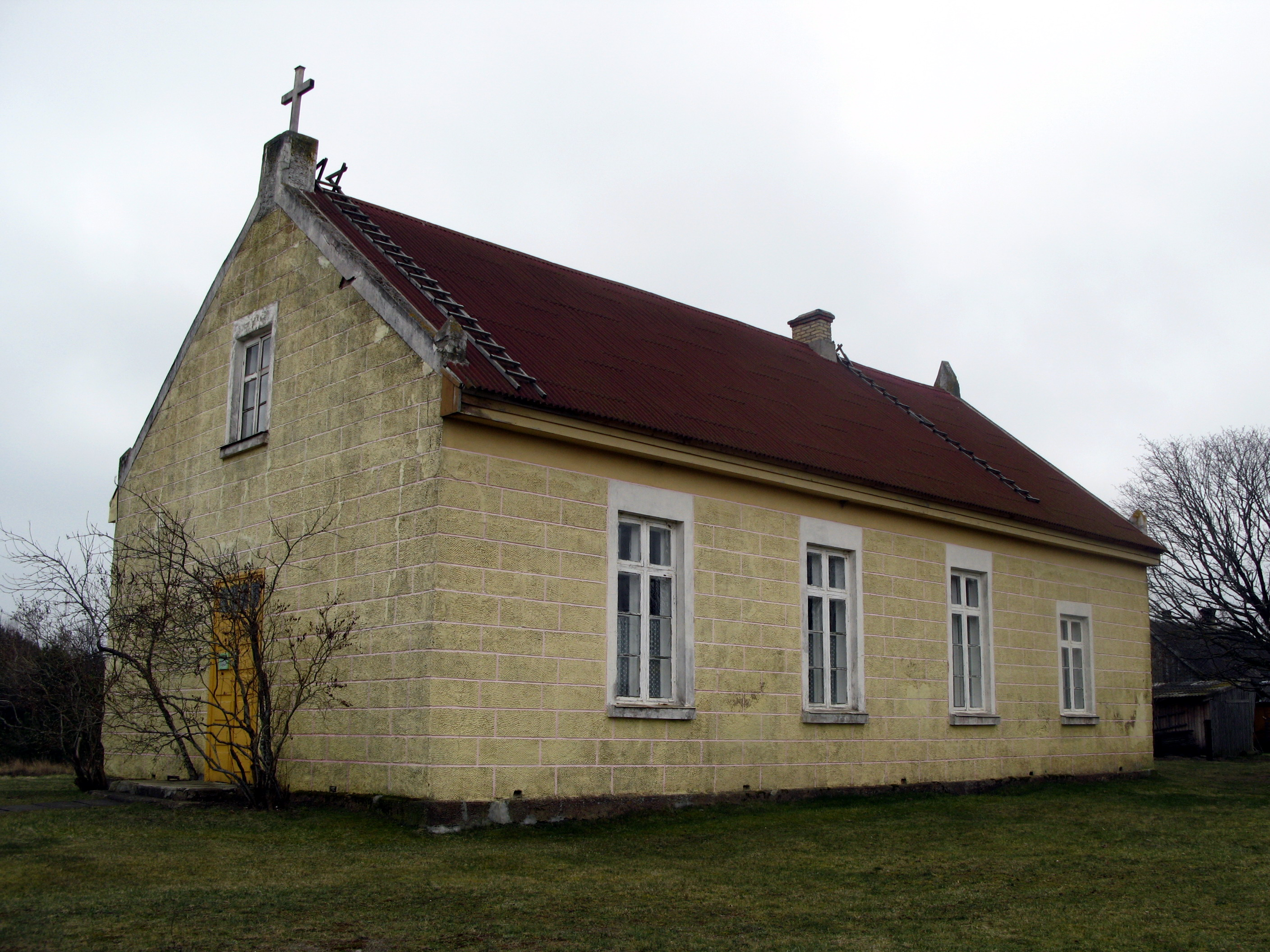 Pavadinimas: lv Pitrags, 2008.g. 5.aprilis.jpg Data: 2008-04-5 11:25 Šaltinis: panoramio Autorius: Sirujs Enobs